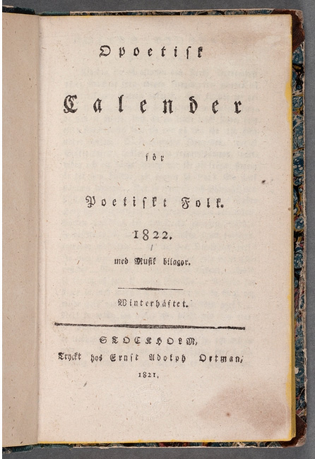 Opoetisk kalender. Titlepage.